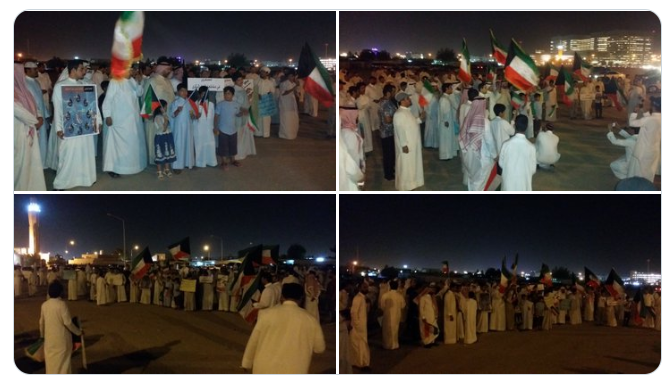 اعتصام للكويتيون البدون استمر لاكثر من 10 ايام ولساعات متأخرة من الليل